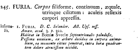 Beschreibung der nicht nachgewiesenen Tierart Furia infernalis in Carl von Linnés Werk Systema Naturae